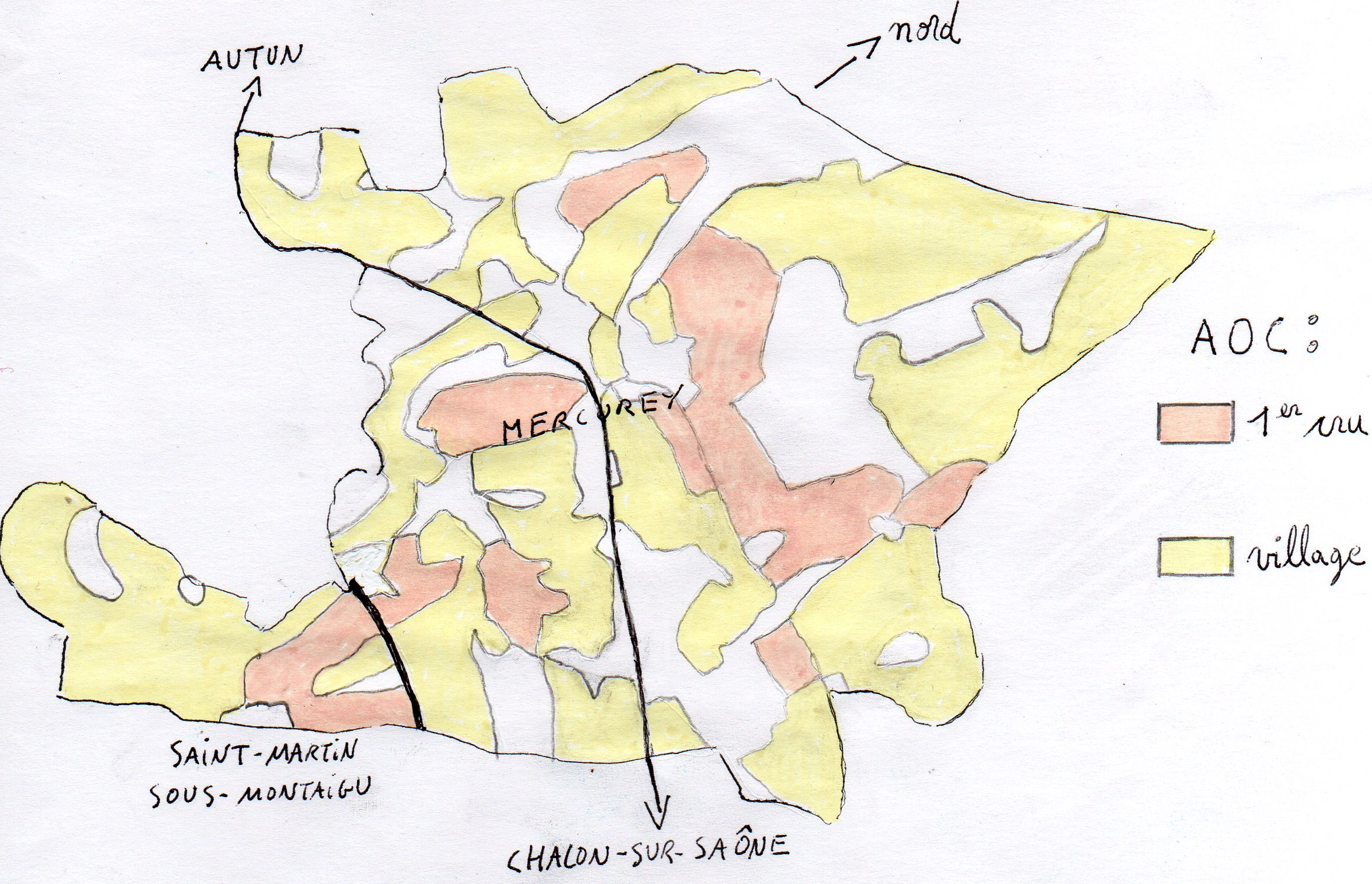 Carte du vignoble de l'AOC Mercurey